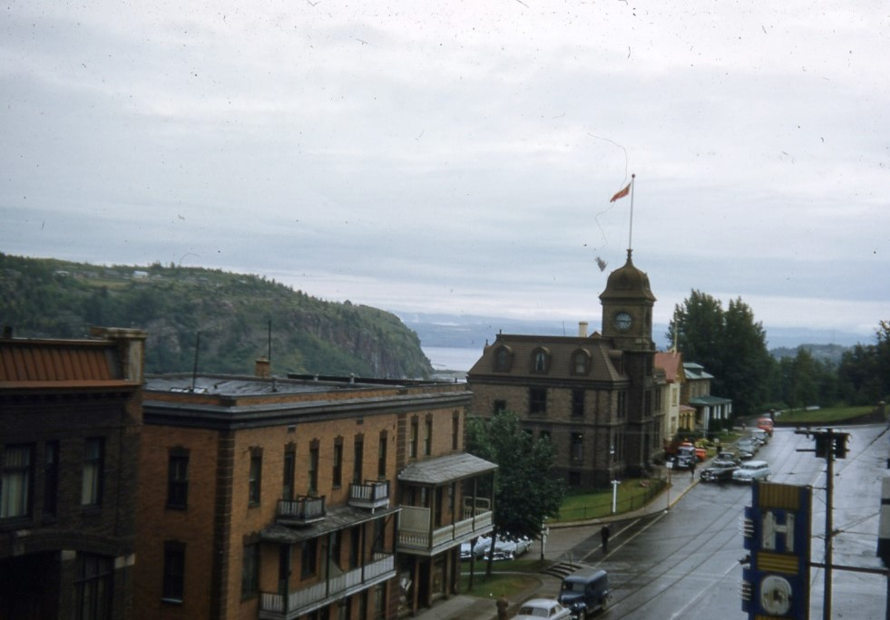 Diapositive illustrant la rue Racine de Chicoutimi dans la région administrative de Saguenay-Lac-Saint-Jean.